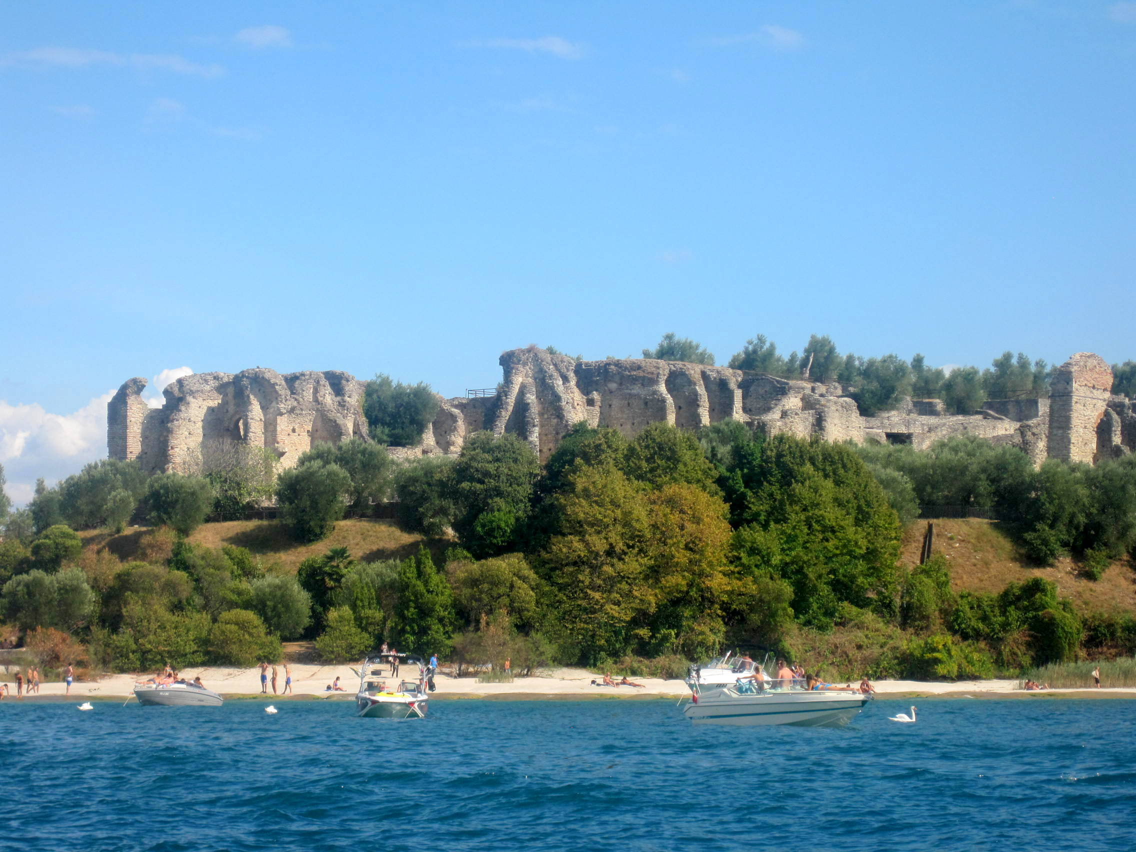 Area archeologica Grotte di Catullo This is a photo of a monument which is part of cultural heritage of Italy.